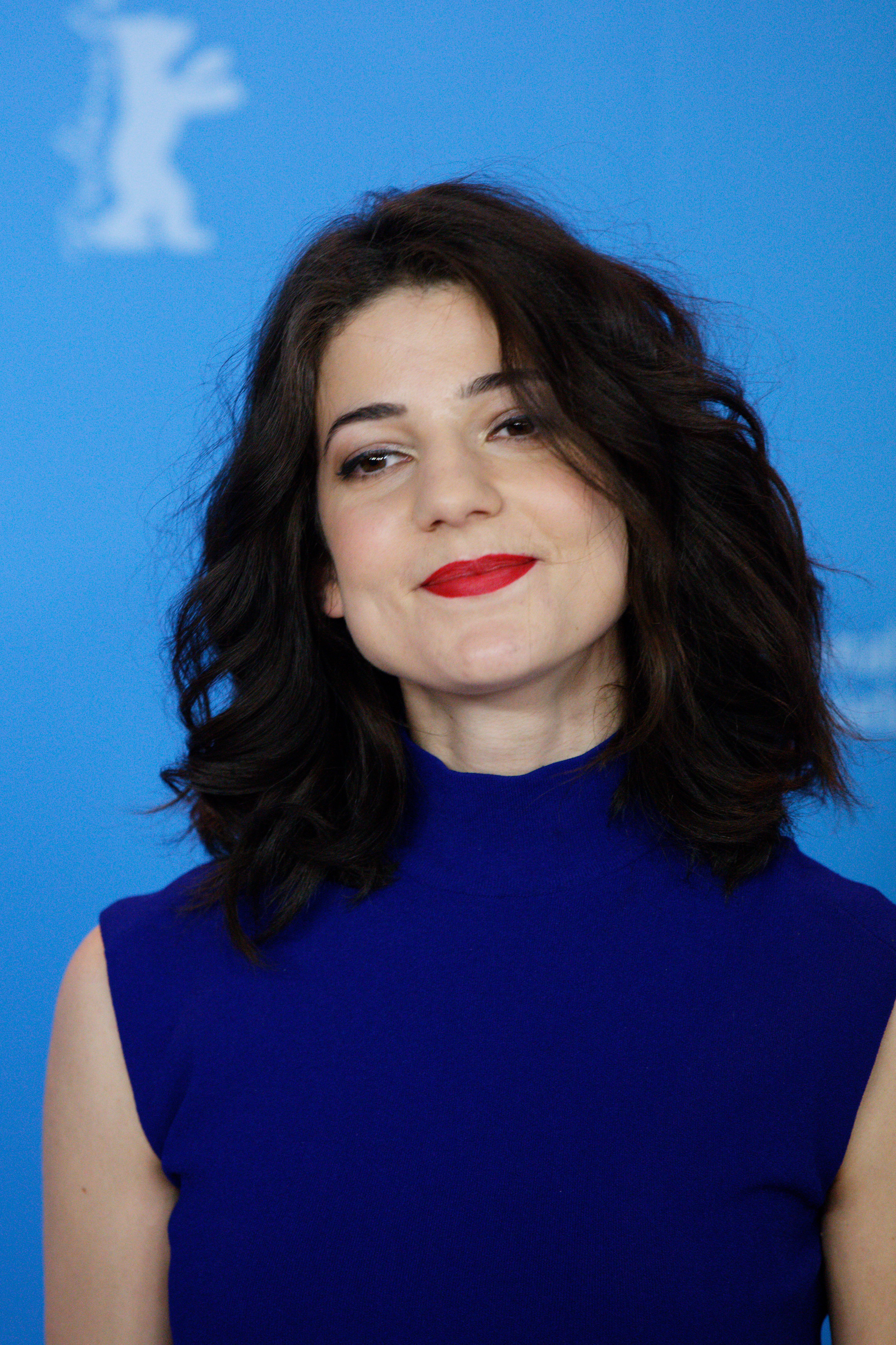 Esther Garrel beim Photo Call zu Call Me By Your Name bei der Berlinale 2017